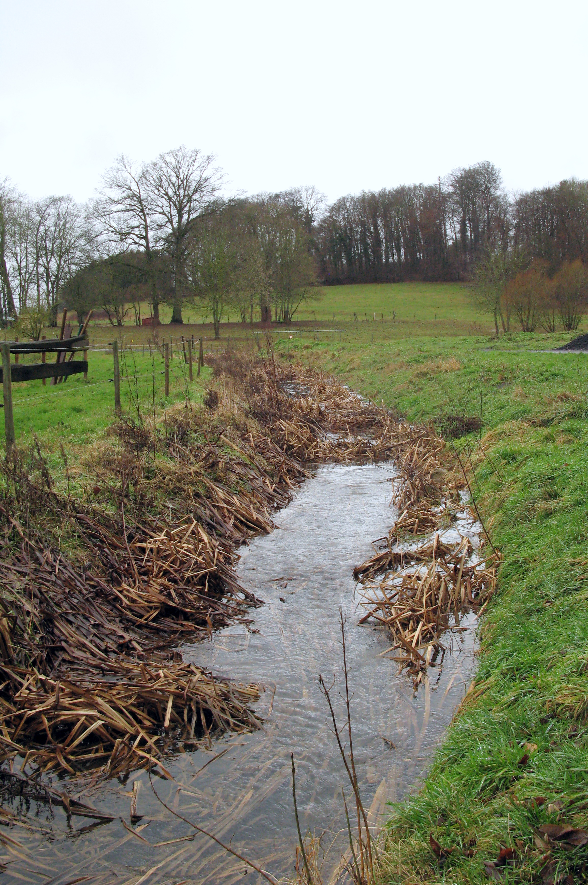 Le Brüll à Aubange (Belgique)